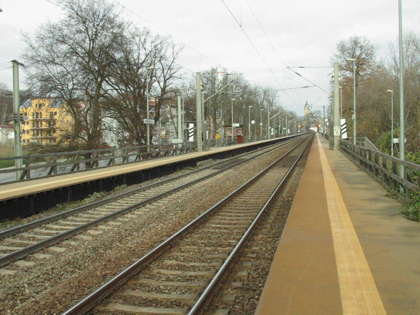 Blick über die provisorischen Holzbahnsteige des Haltepunktes Jena Paradies in Richtung Innenstadt Jena